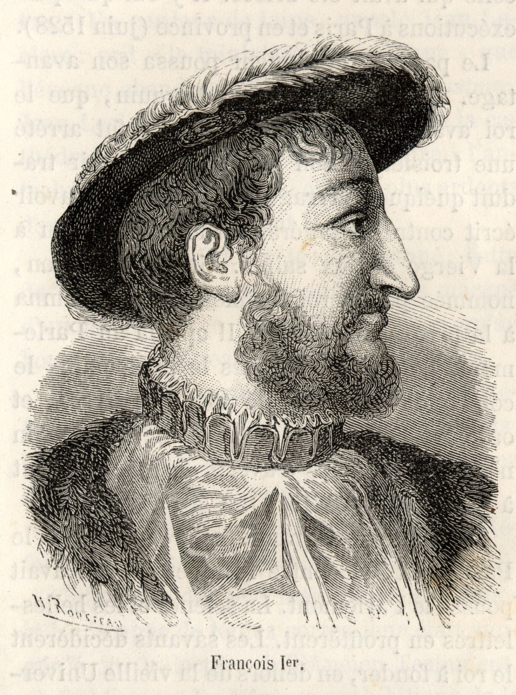 François 1er